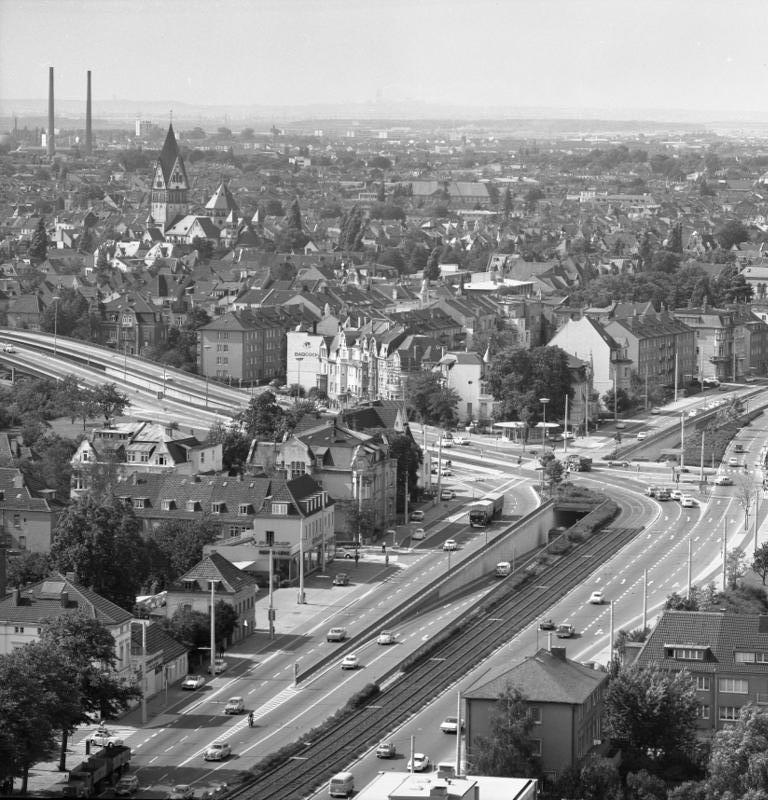 Übersichtsaufnahmen von Bonn und Bad Godesberg vom neuen Hochhaus im Tulpenfeld aus